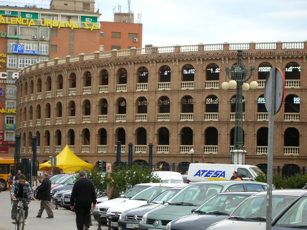 Nunca he estado dentro de ella. No me gusta verlo. Plaza de Toros, Valencia, Spain.